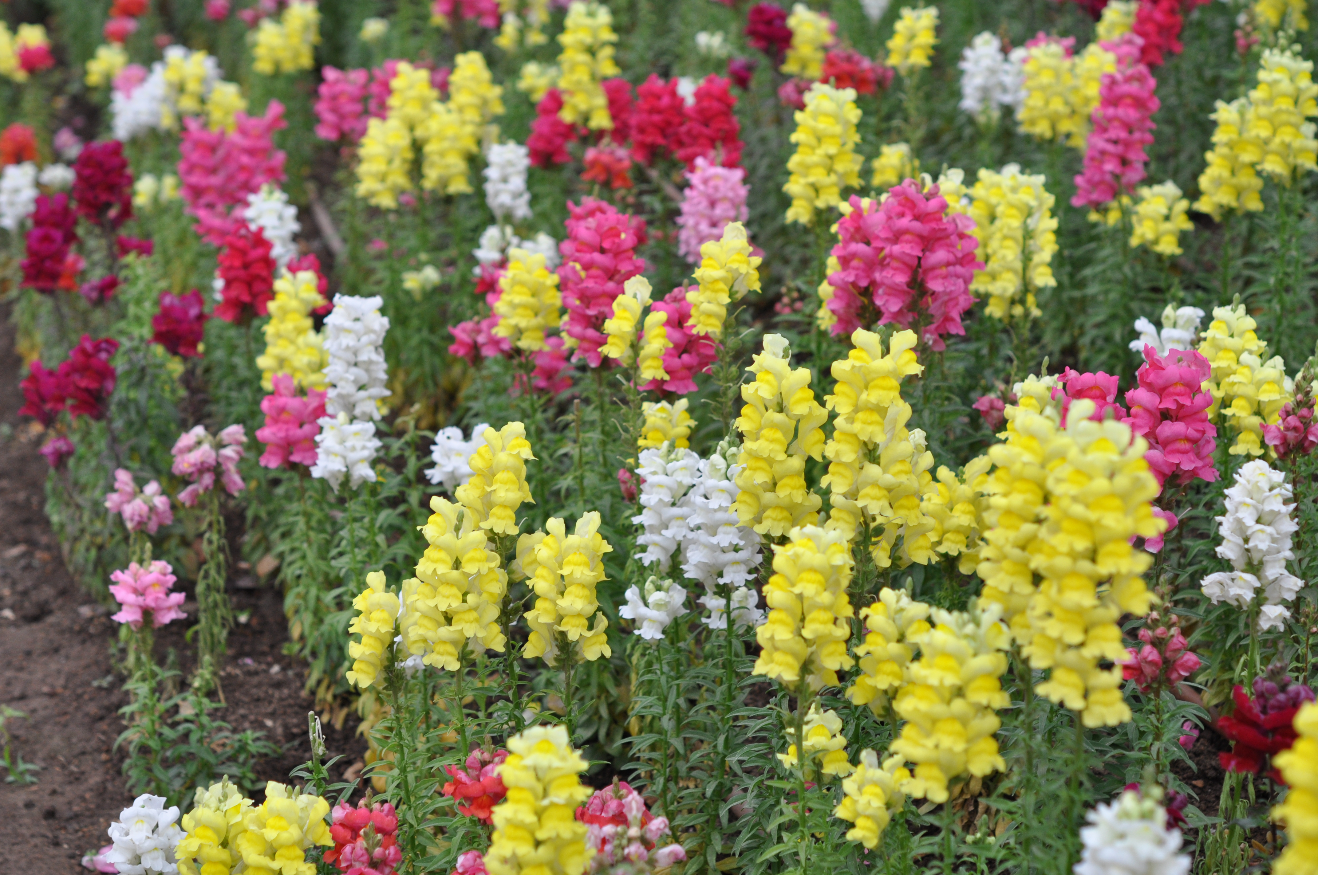 გადაღებულია იერუსალიმში Taken in Juerusalem